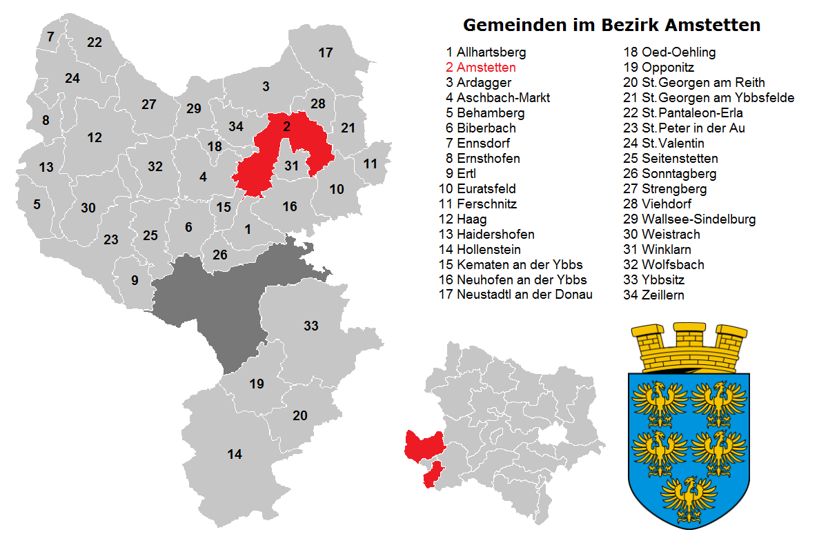 Bezirk Amstetten